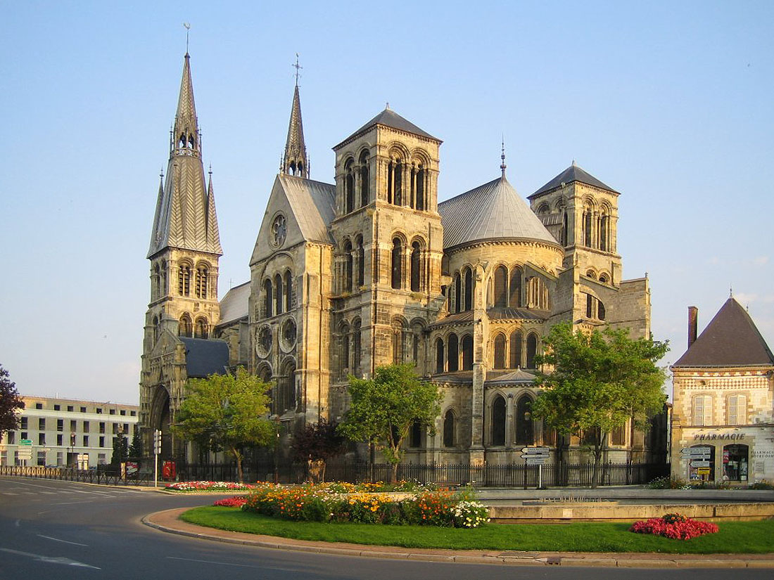 Notre-Dame-en-Vaux, in Châlons-en-Champagne (France). Photo taken by me.